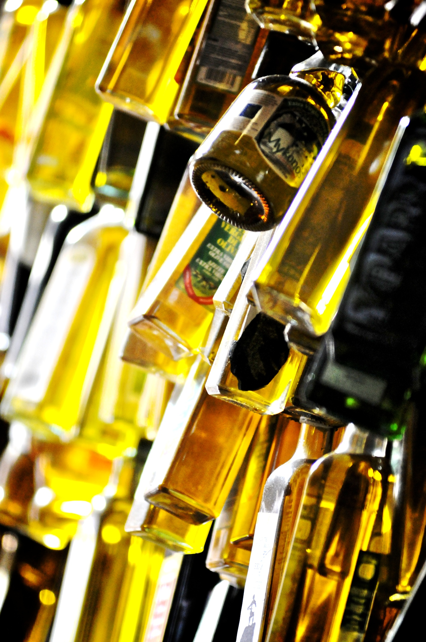 Garrafas de azeite de oliva.